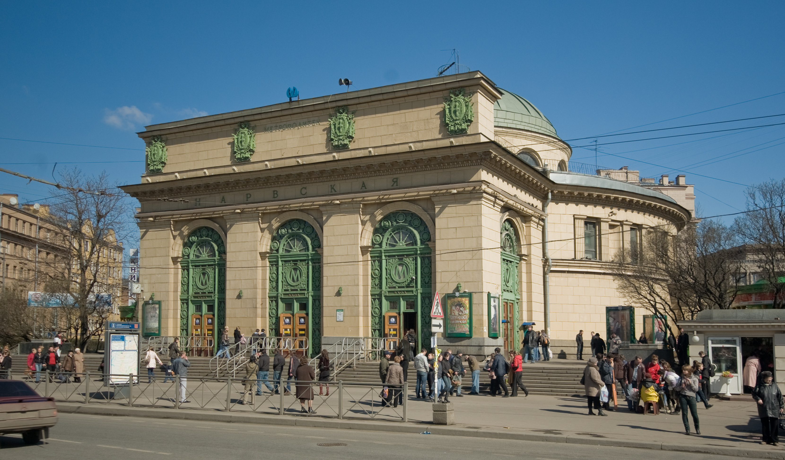 Вестибюль ст. м. Нарвская. Санкт-Петербург